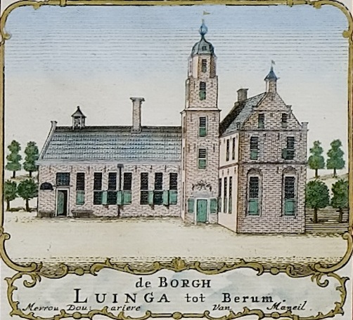 Borg Luinga in Bierum. Uitsnede uit de kaart van Theodorus Beckeringh uit 1781